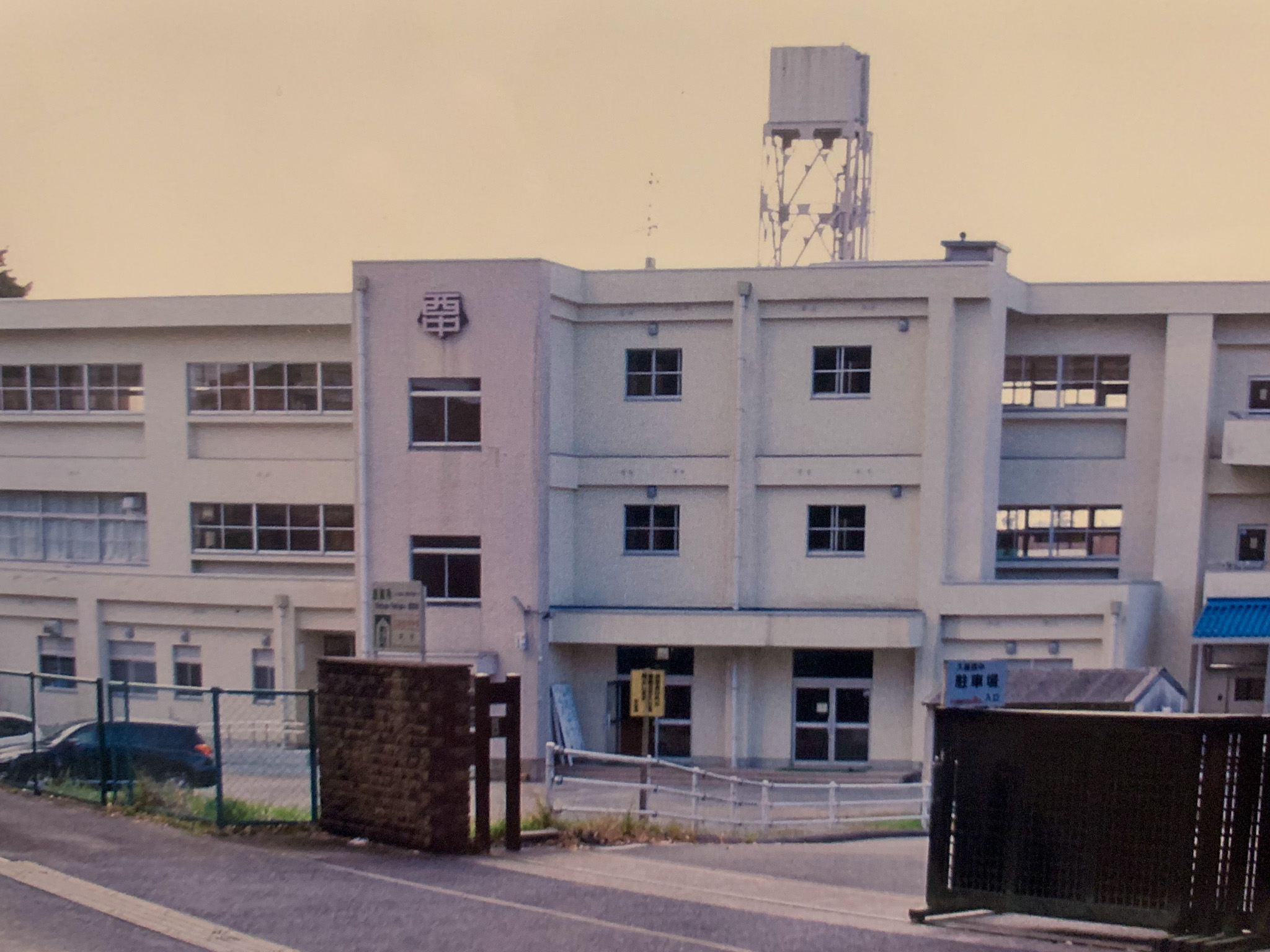 津市立久居西中学校の校舎